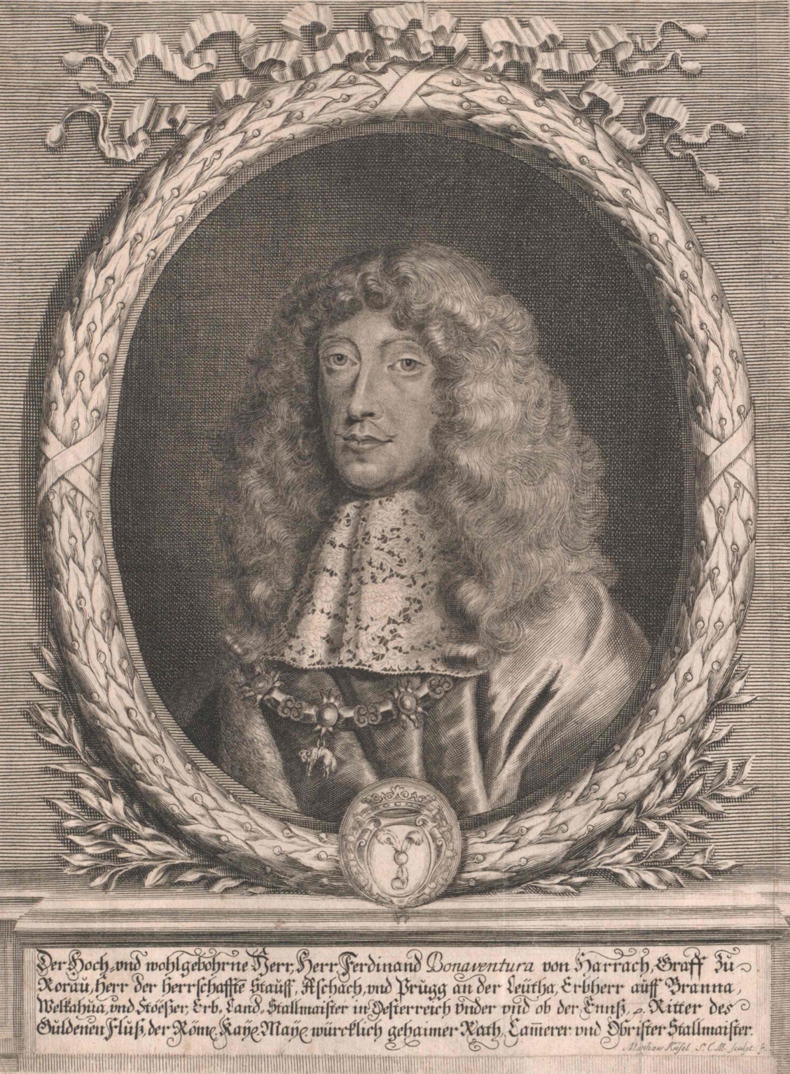 Ferdinand Bonaventura hrabě z Harrachu (1636–1706)